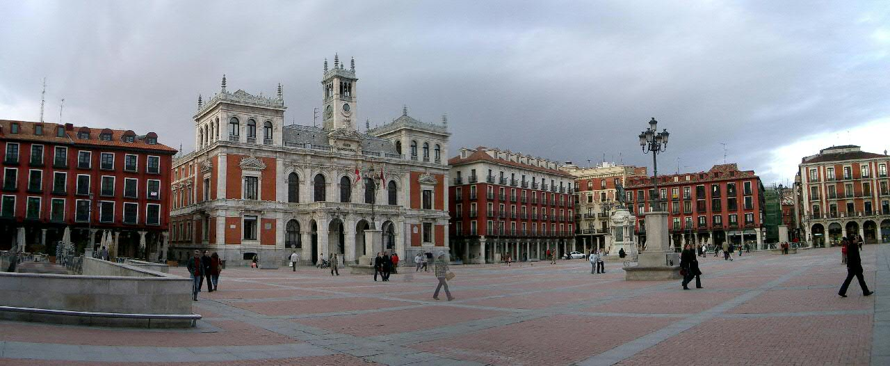 Panorámica de la Plaza Mayor de Valladolid y su Ayuntamiento